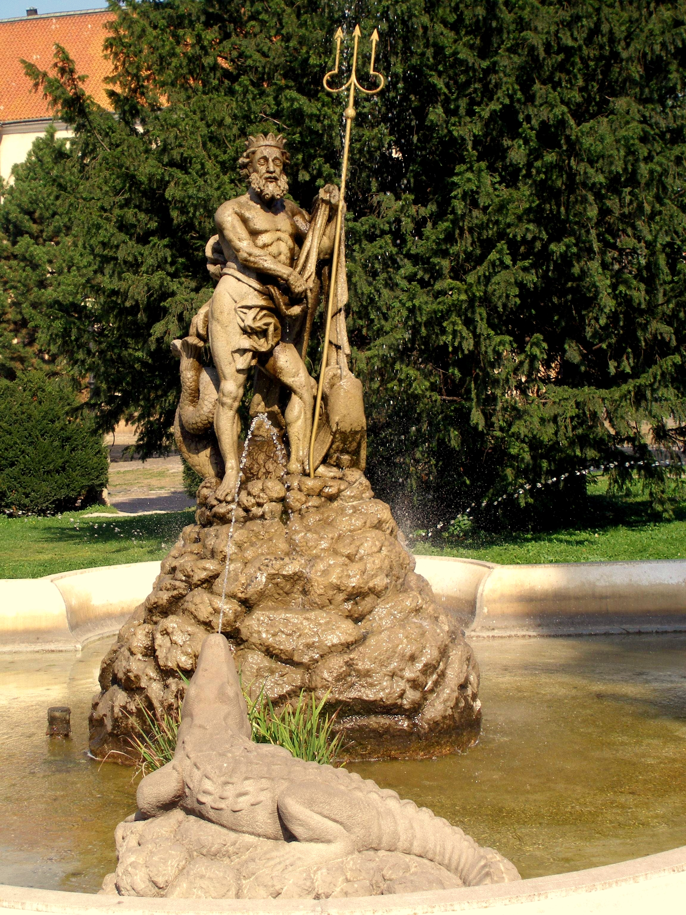 Neptúnova fontána na verejnom priestranstve Hlavná ulica v Prešove, región Šariš, Slovakia. Je najstaršou aj najkrajšou fontánou v meste. Pochádza z roku 1789